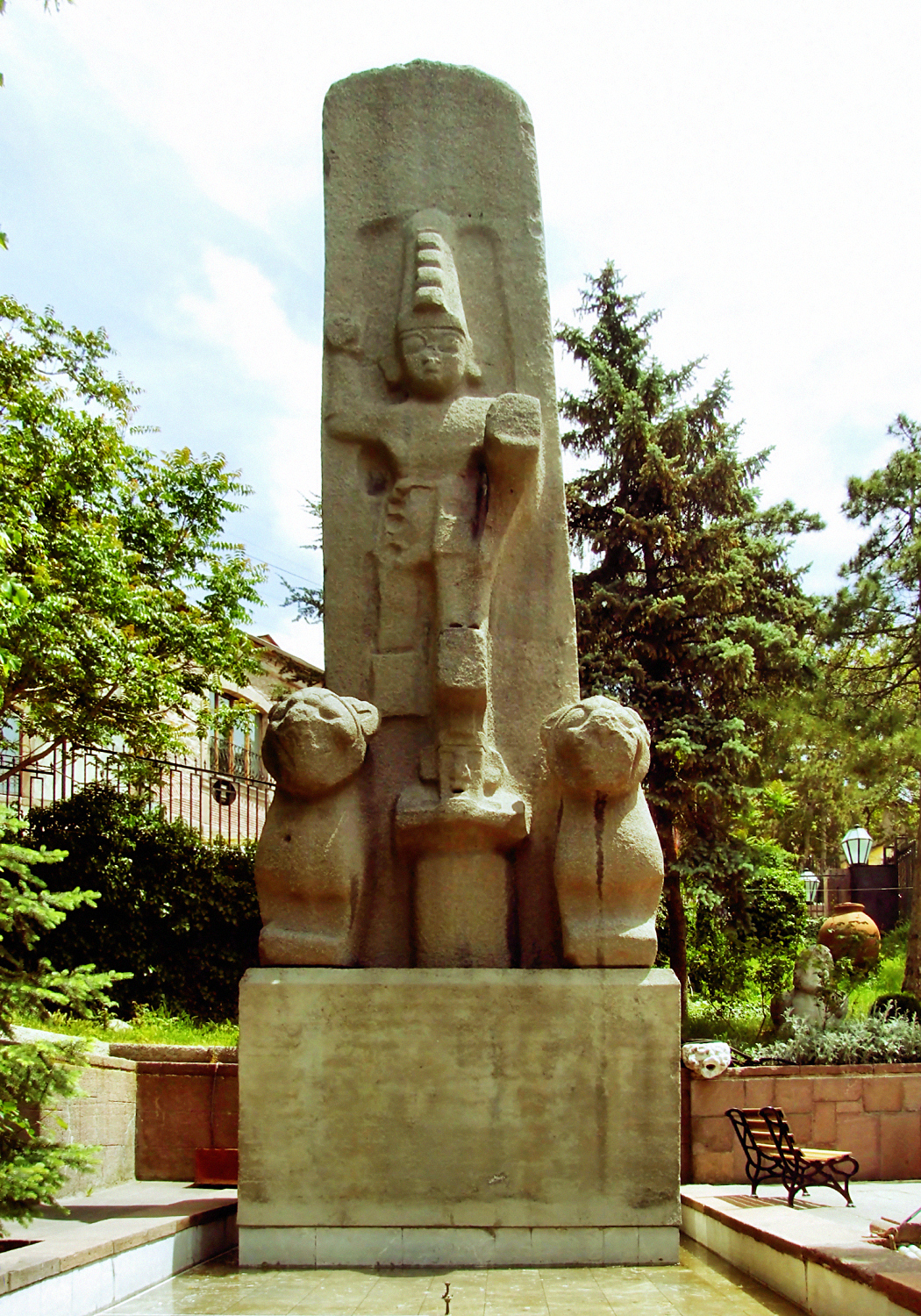 Muzeum Cywilizacji Anatolijskich w Ankarze (dziedziniec); Museum of Anatolian Civilizations in Ankara (yard)